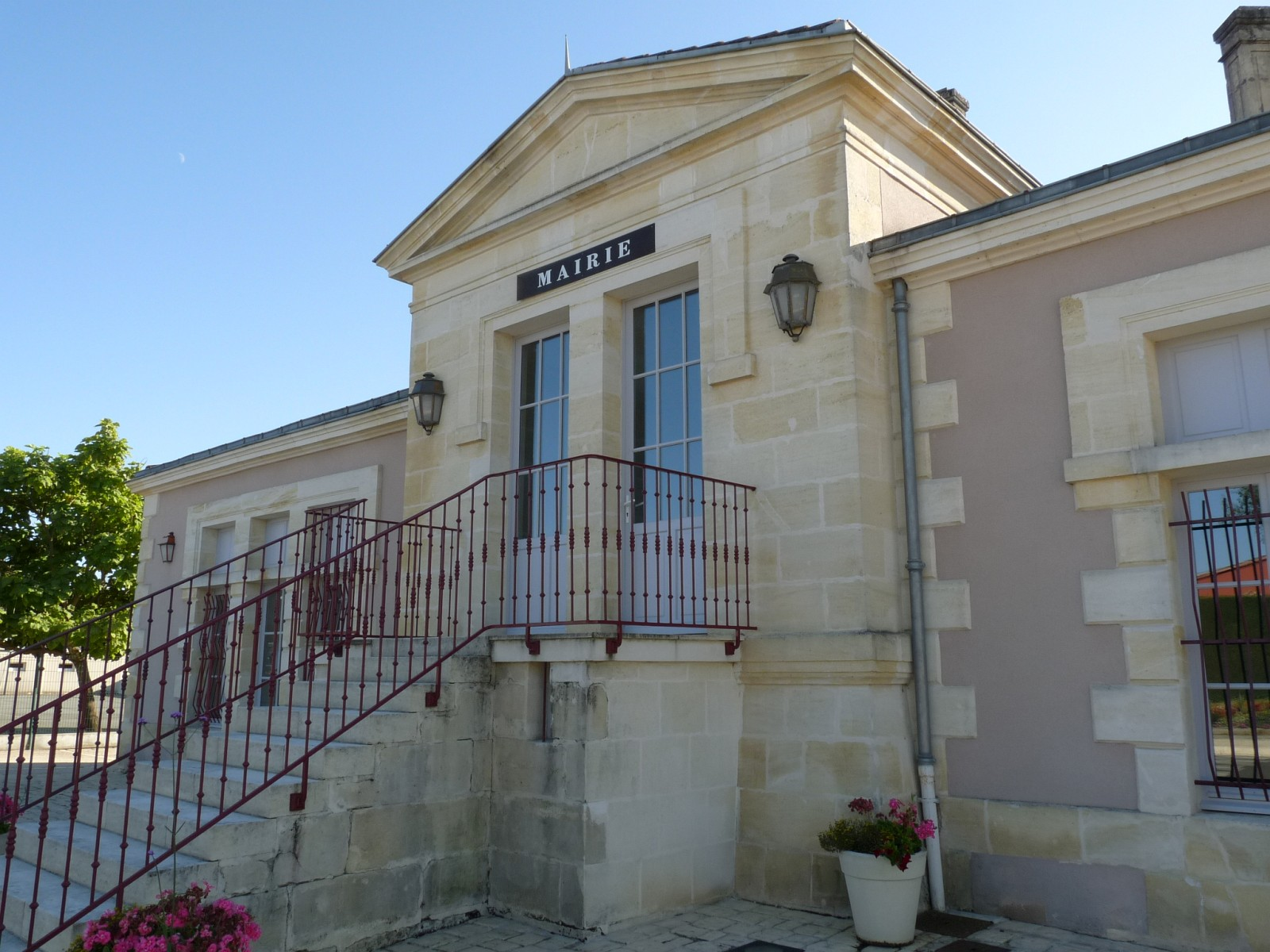 Mairie de St-Caprais-de-Blaye, Gironde, France